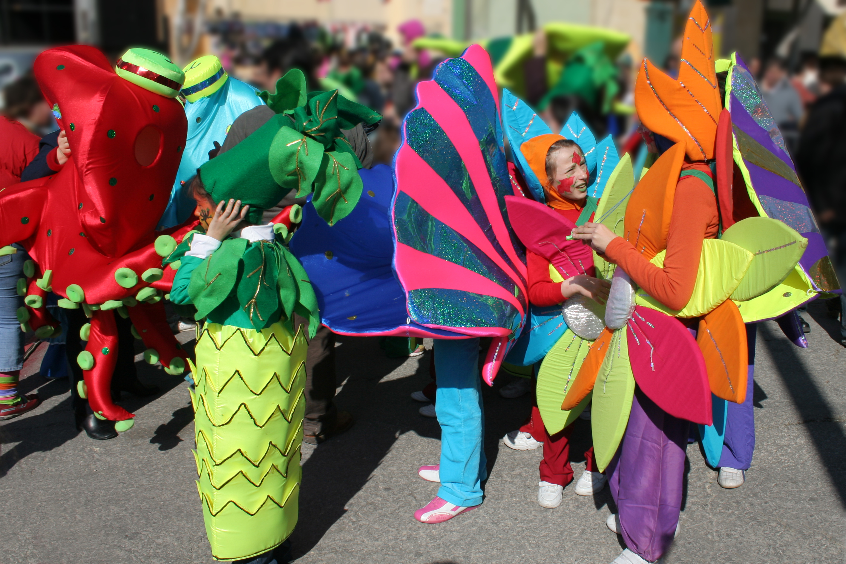 Gozo, Nadur, carnival